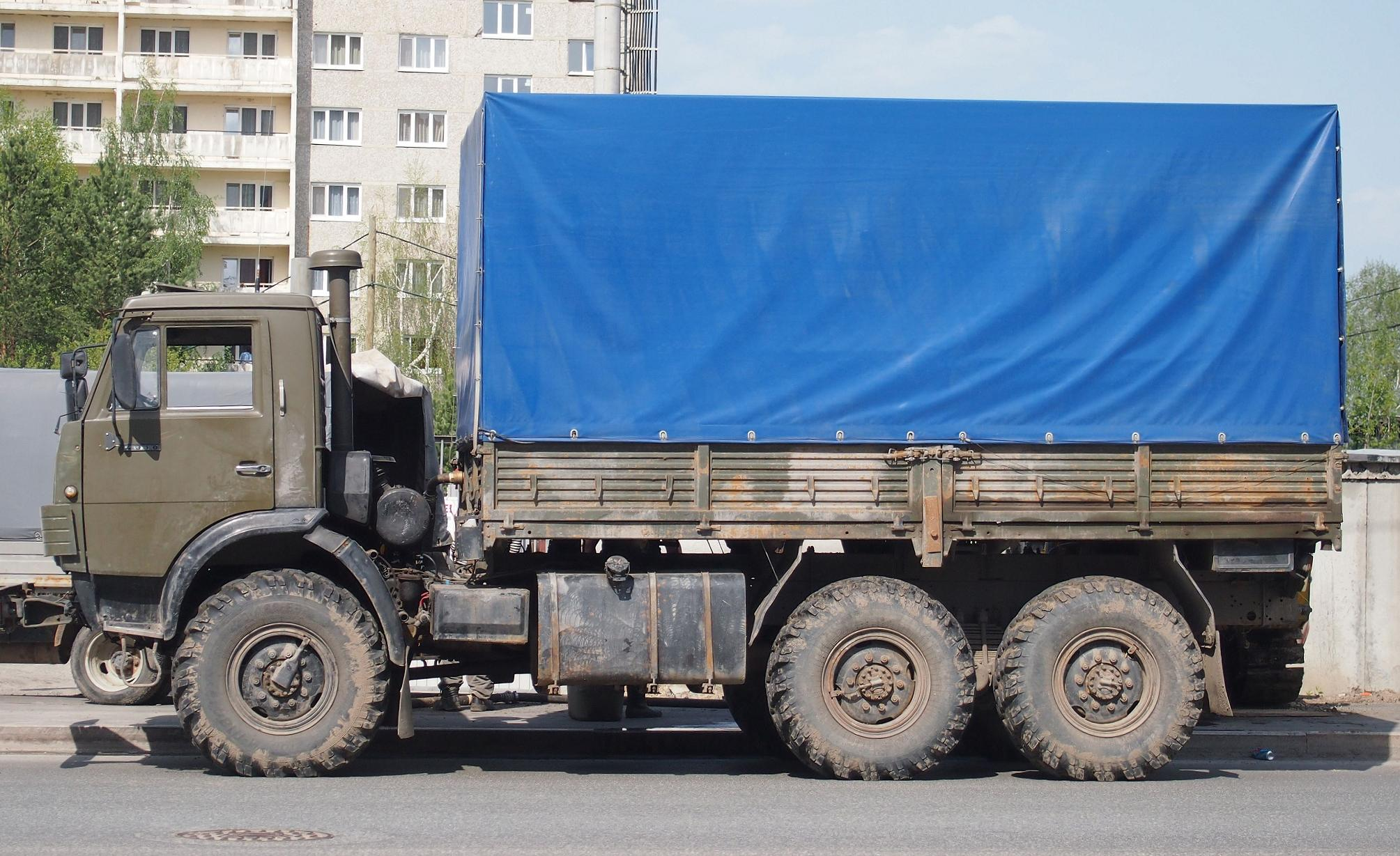 КамАЗ-4310, Тюмень